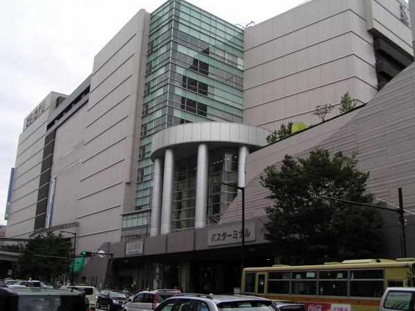 2005年9月25日に投稿者が撮影 上大岡駅 本当にごみごみしたところで、撮影するのは大変でした。